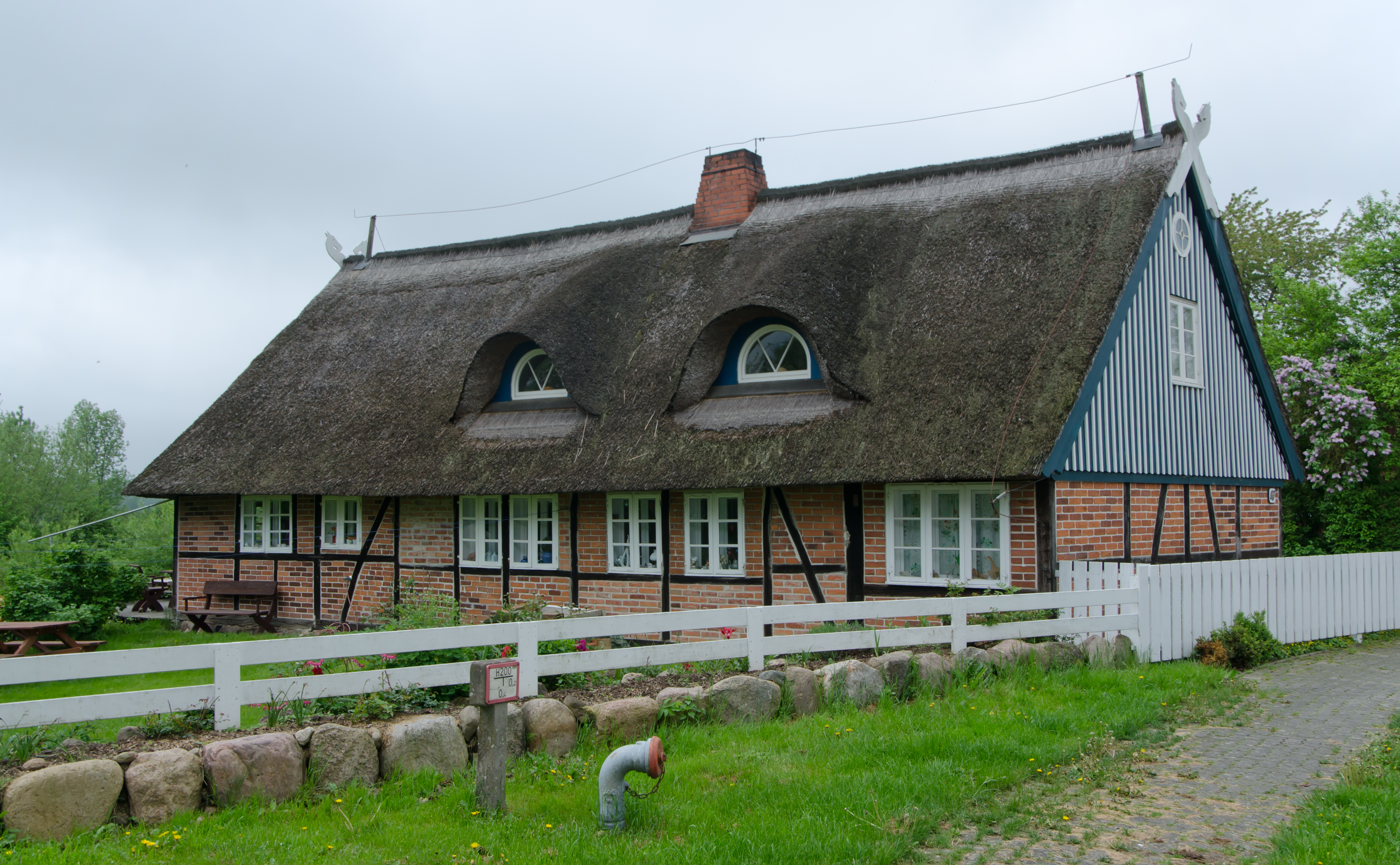 Duvensee reetgedecktes Fachwerkhaus In de Pütt 10